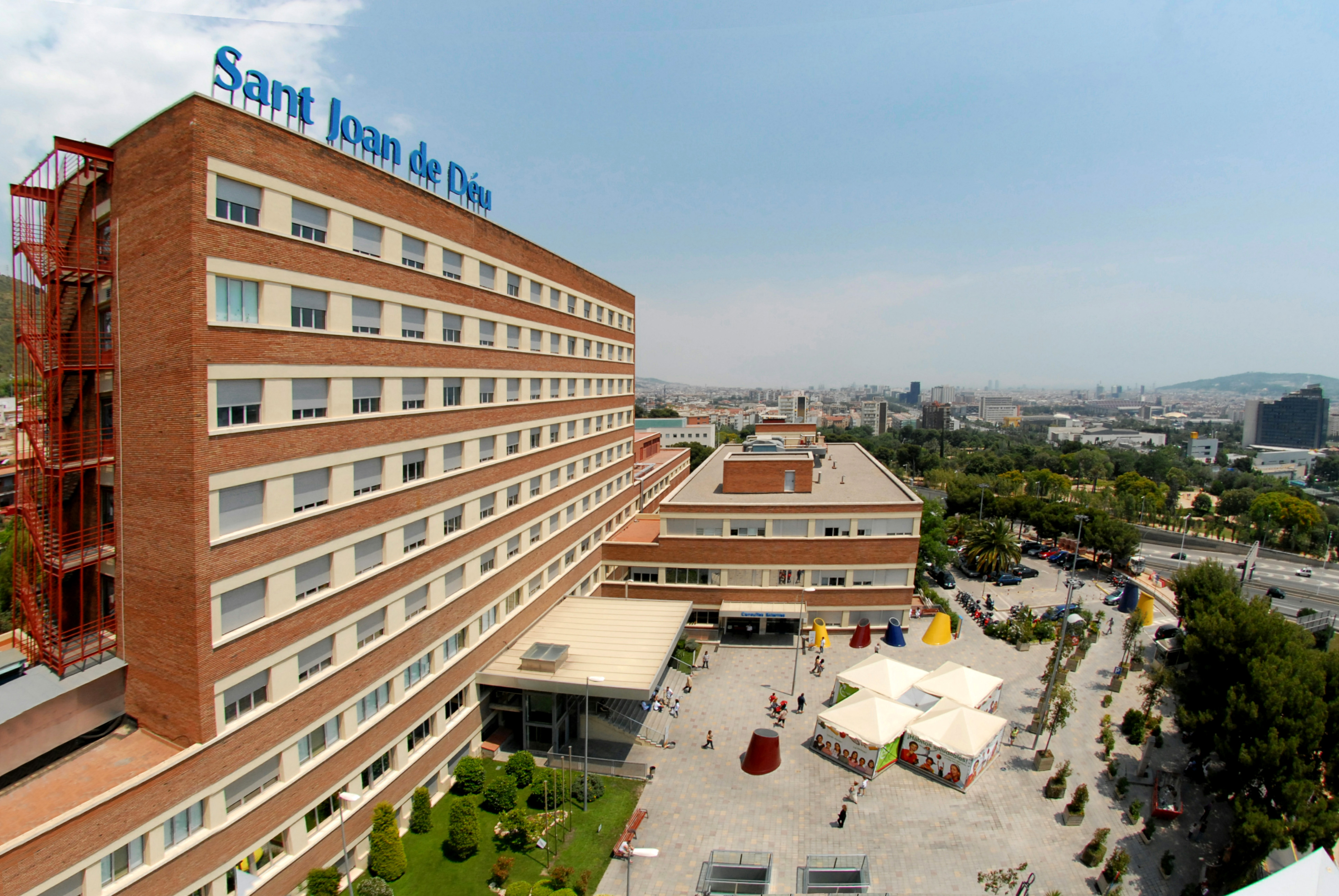 Vista de la fachada principal del Hospital Sant Joan de Déu, Esplugues de Llobregat, provincia de Barcelona